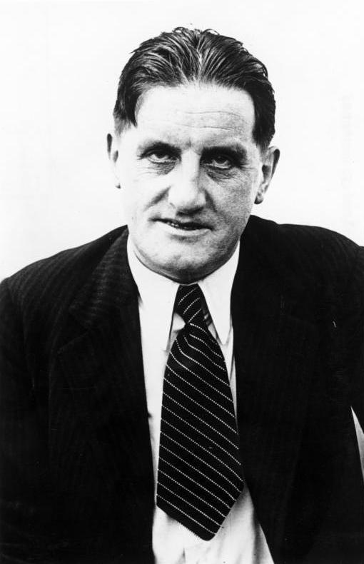 Ernst Hanfstaengl ADN-ZB-Archiv Dr. Ernst Hanfstaengl, Auslandspressechef der NSDAP 5748-34 [1934; Scherl Bilderdienst] [Porträt]